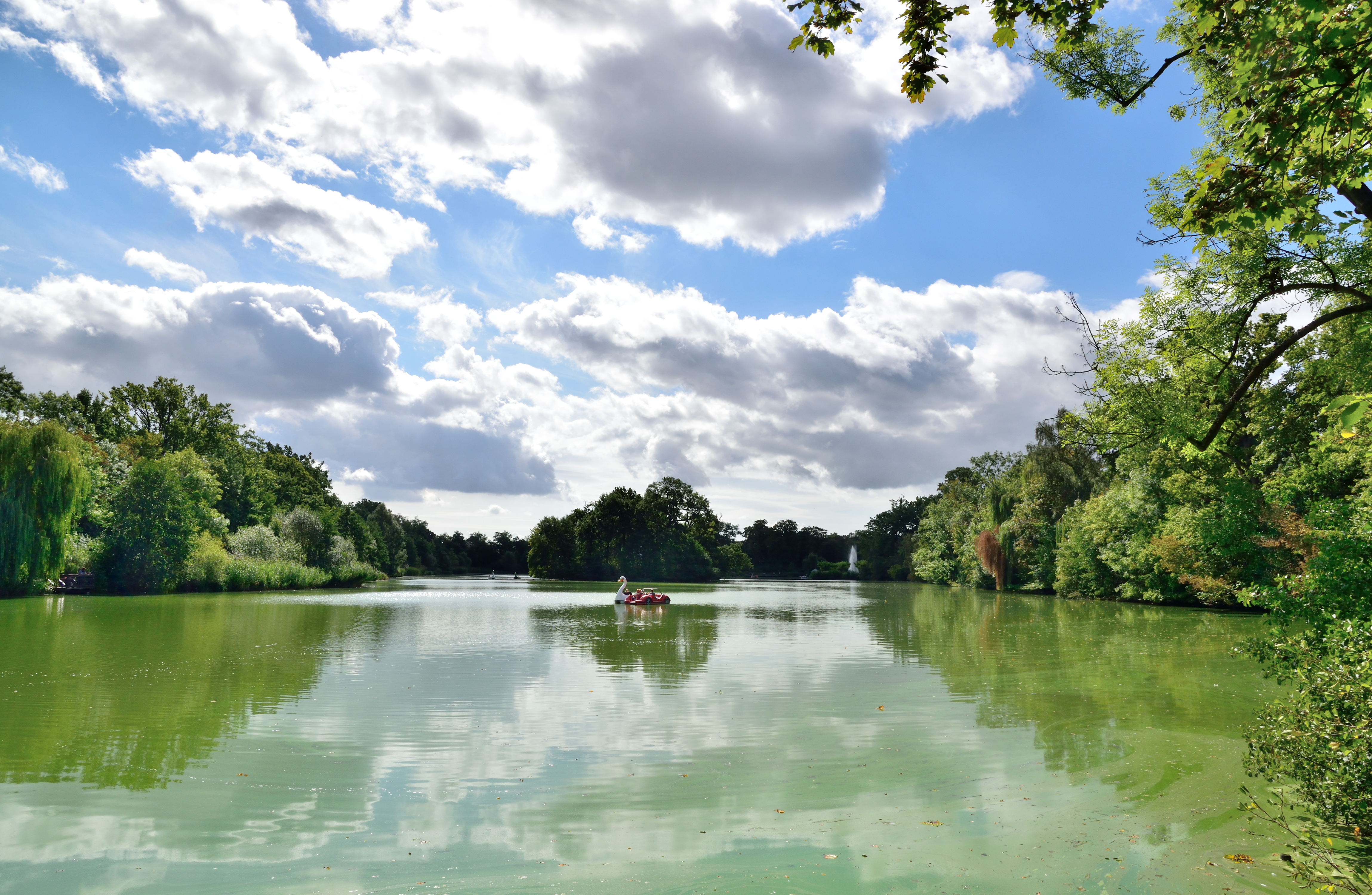 Der Große Teich im Kurpark Bad Nauheim